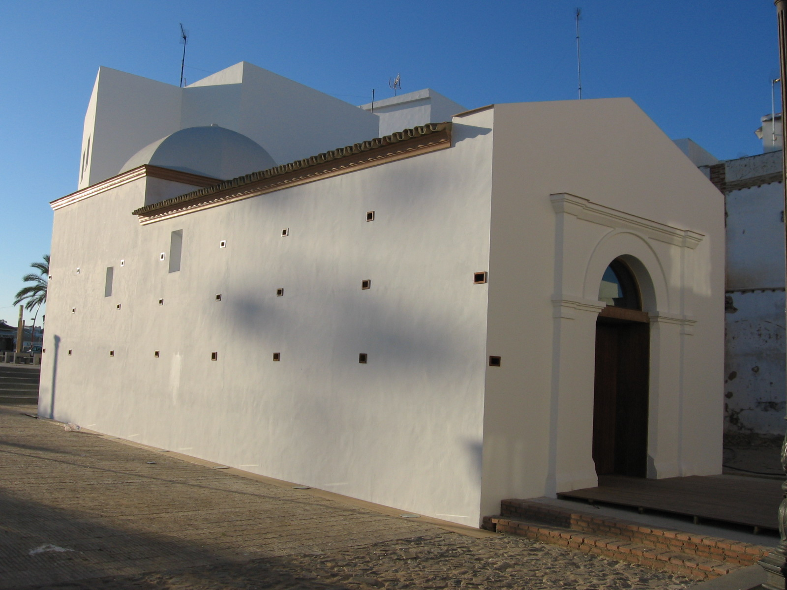 Aspecto actual de la Capilla de San Cristóbal.